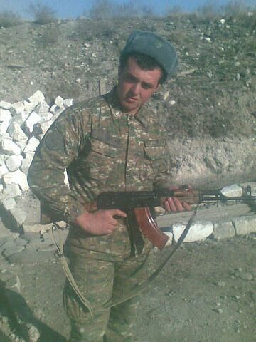 Սարգիս Մովսիսյան